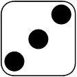 European die face 3